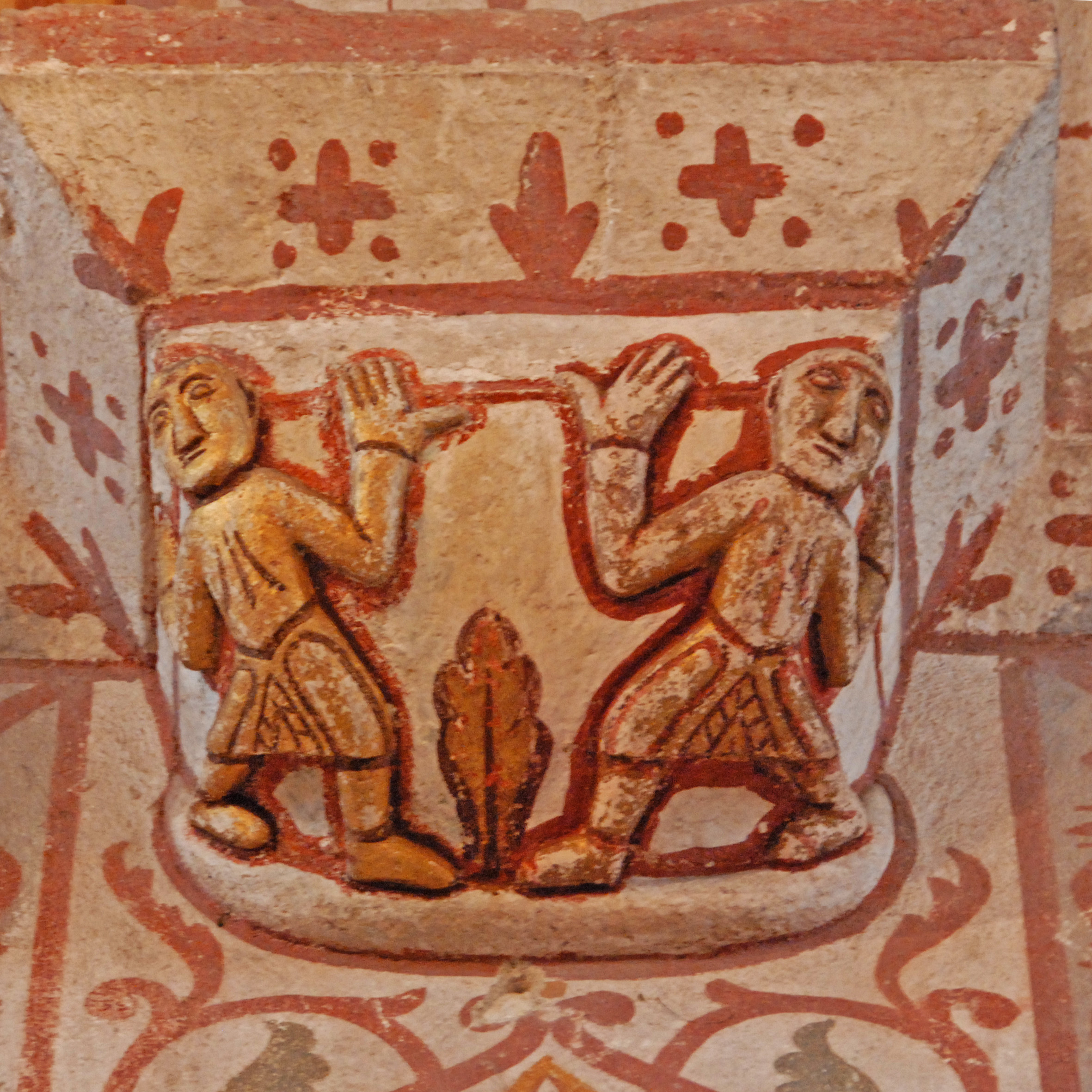 Civaux, Kirchge, Kapitell mit Atlanten